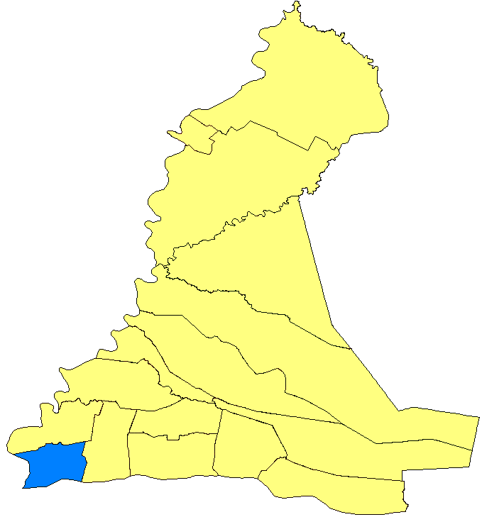 Mapa de Paso de Patria, Paraguay.